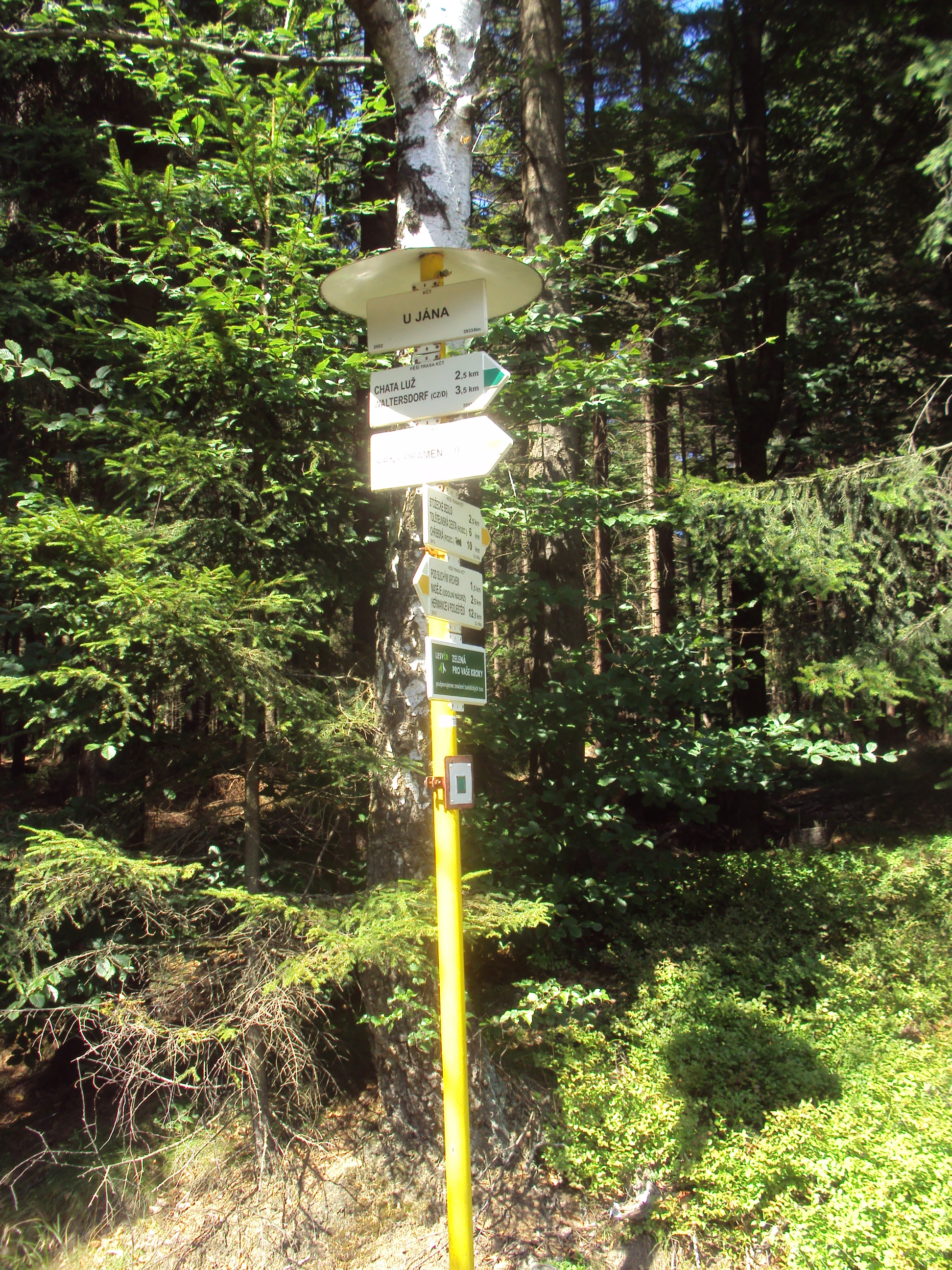 Rozcestník U Jána u silnice k Nové Huti